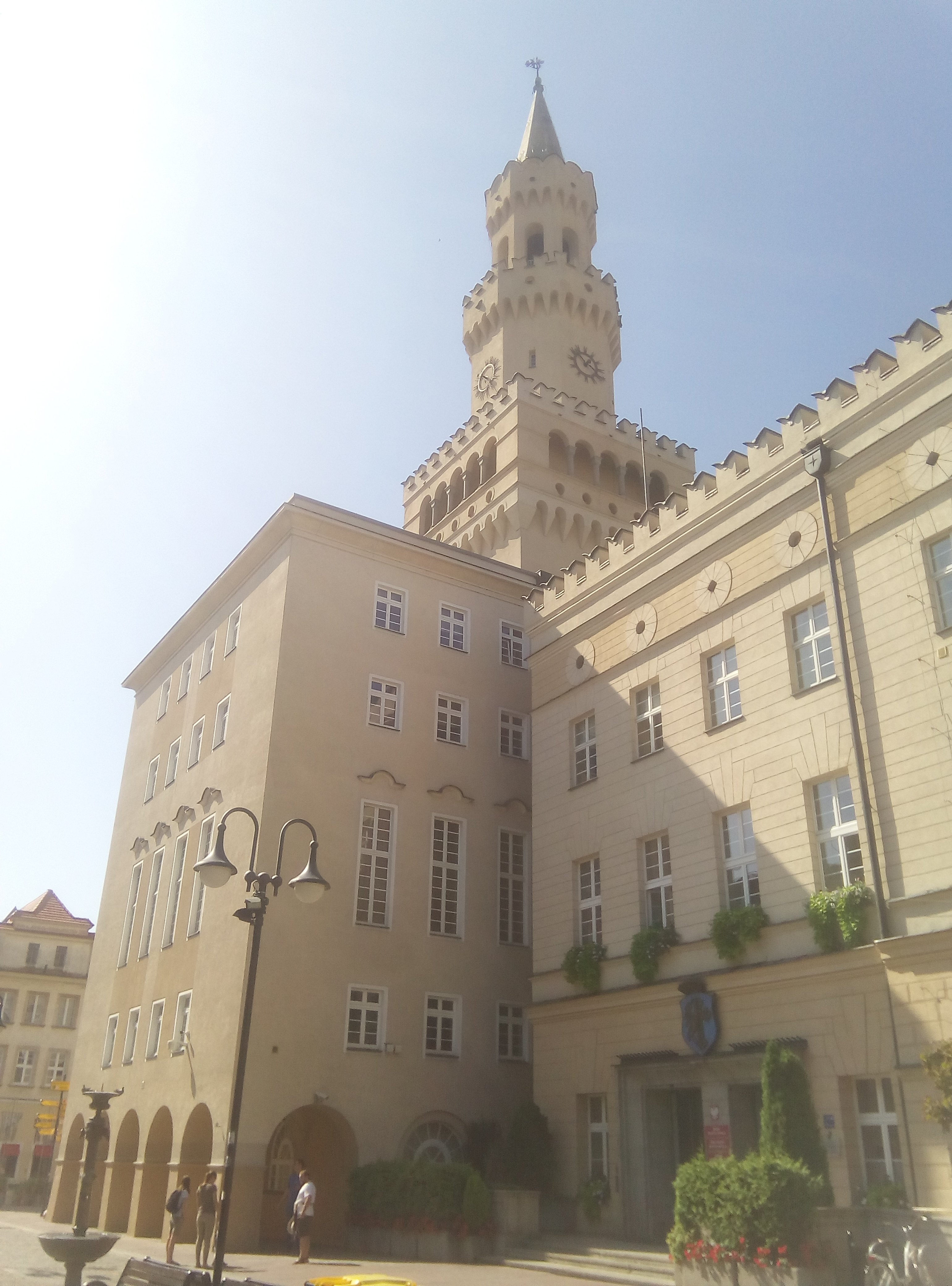 Radnice v Opole na náměstí